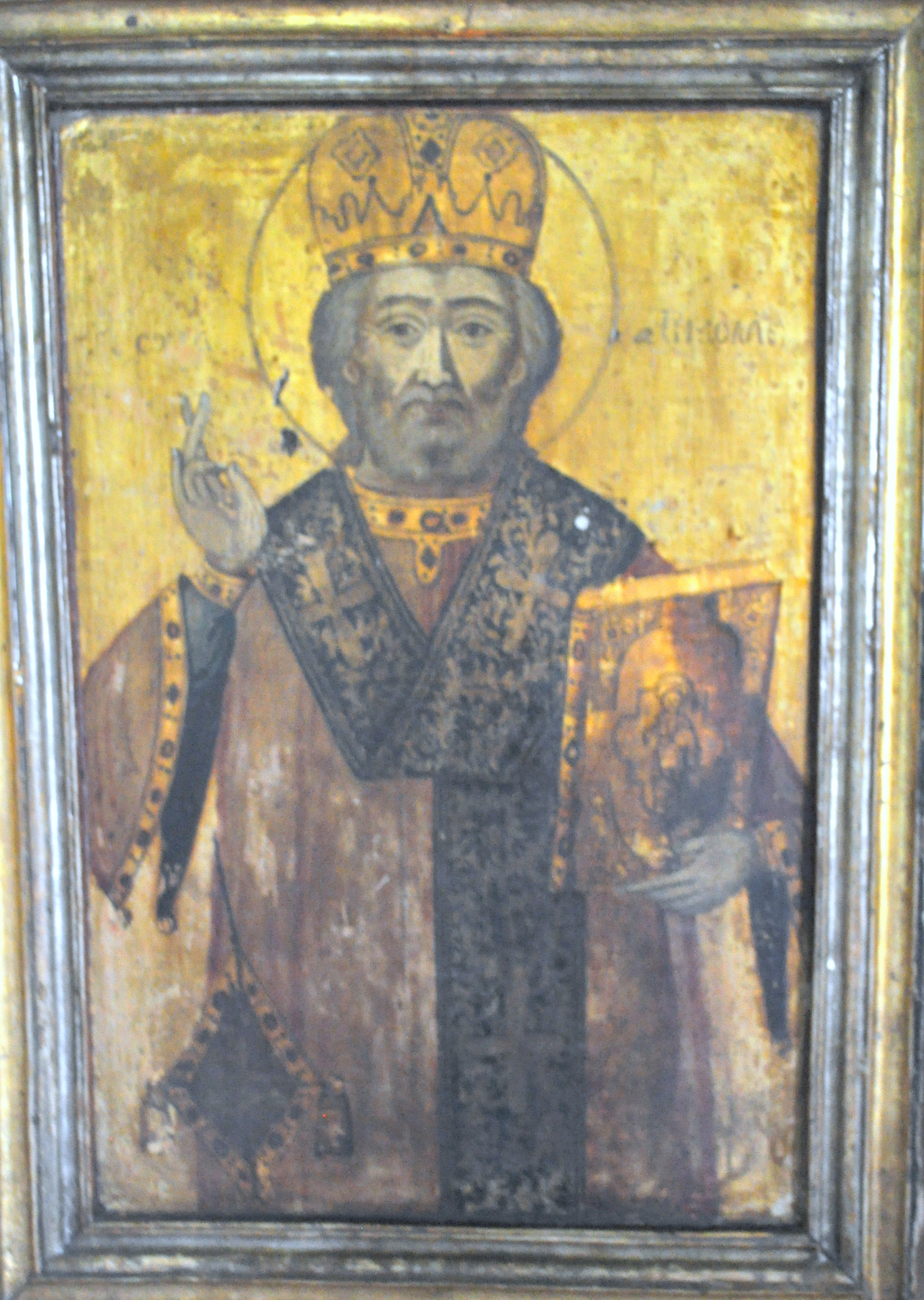 Mănăstirea Lepșa, Vrancea